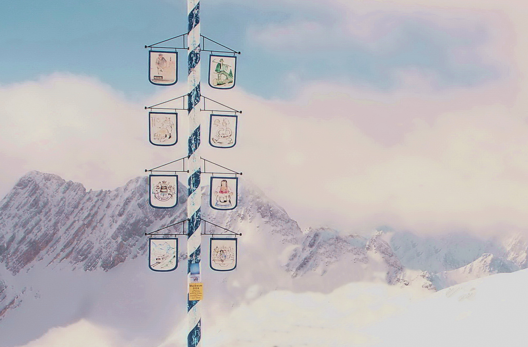 Maibaum 五月柱